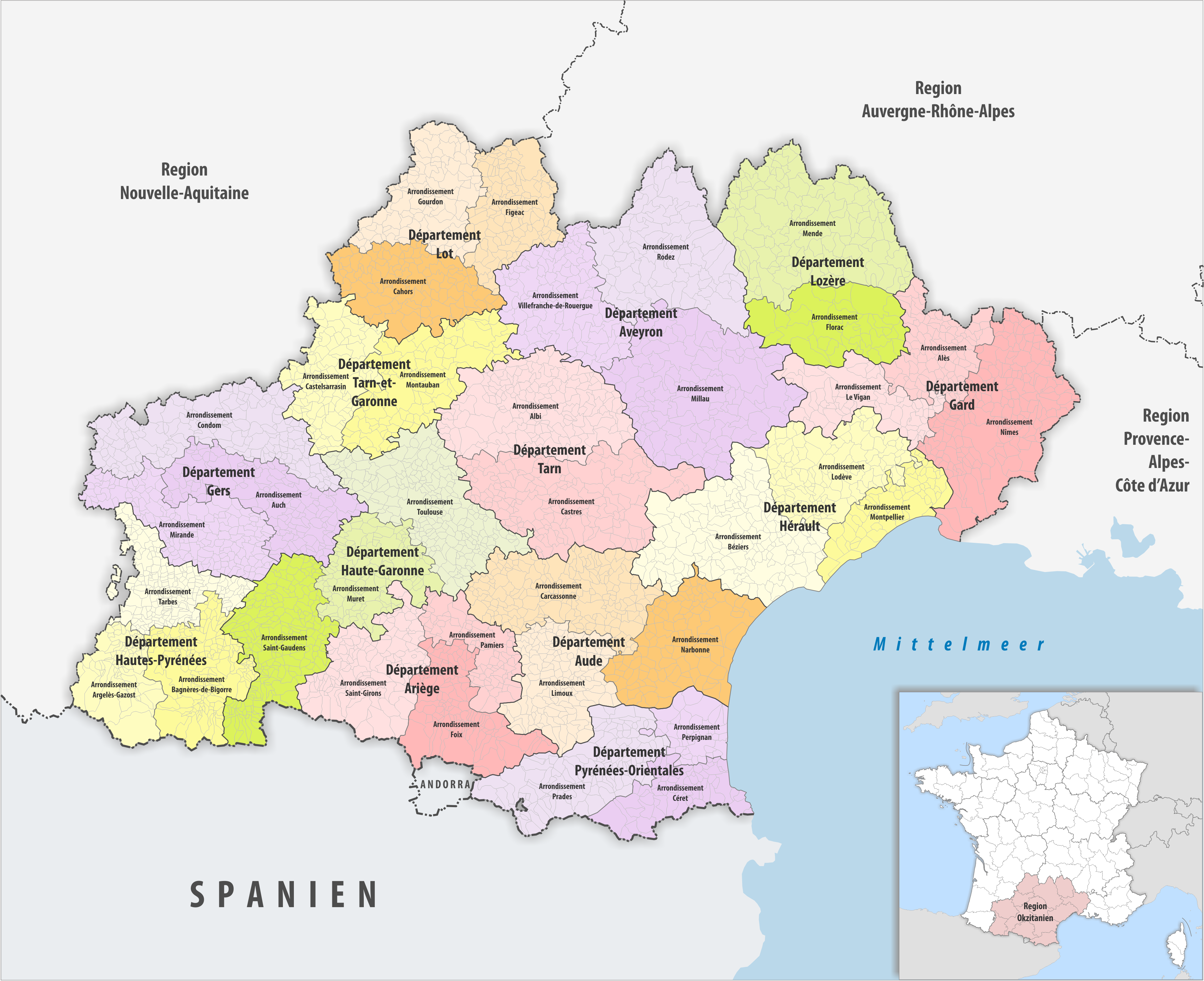 Gemeinden, Arrondissemente und Departemente in der Region Okzitanien